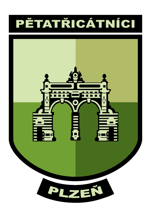 Neoficiální bojový znak plzeňských Pětatřicátníků 2008